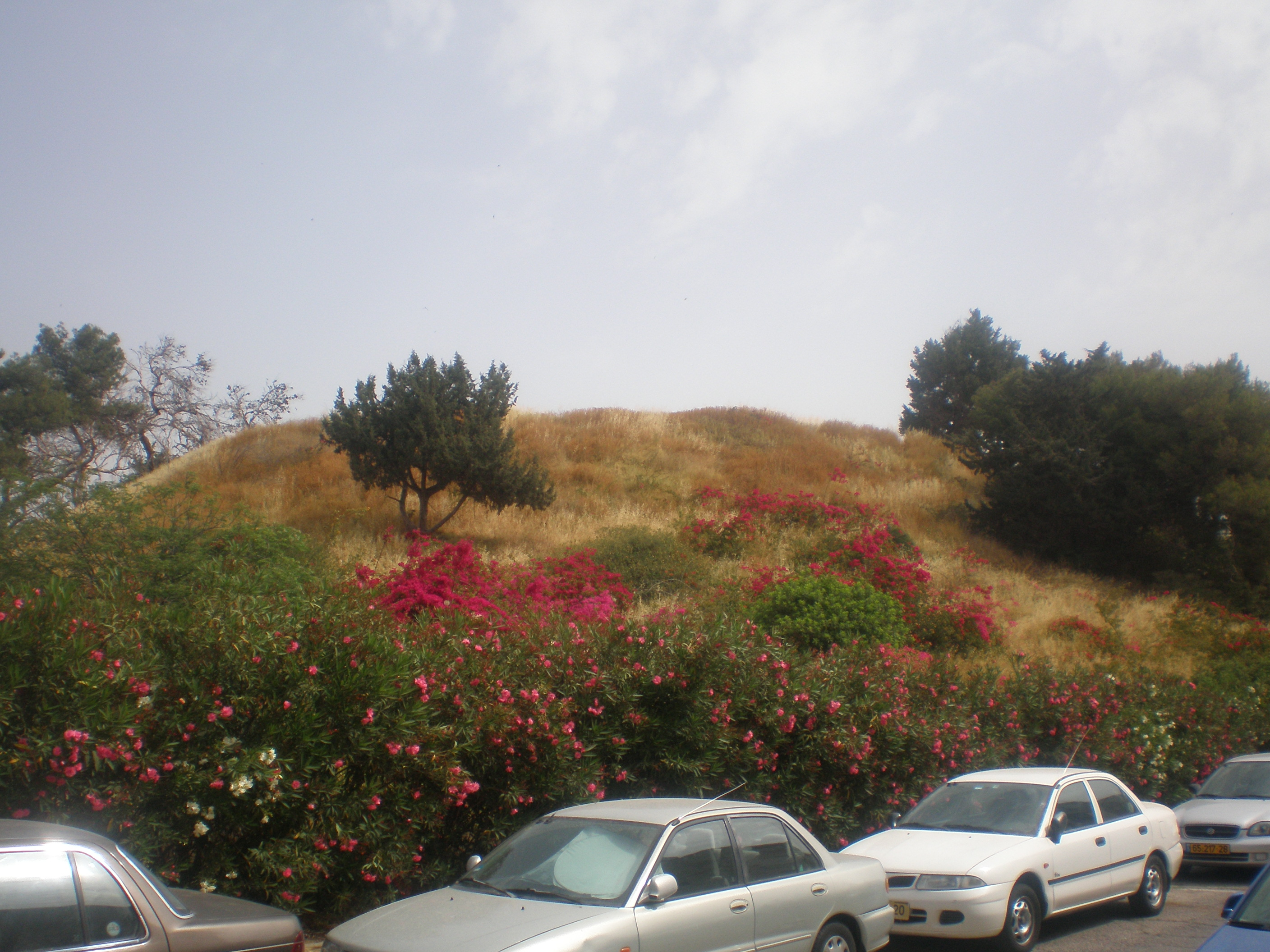 Napoleon Hill, Ramat Gan, Israel